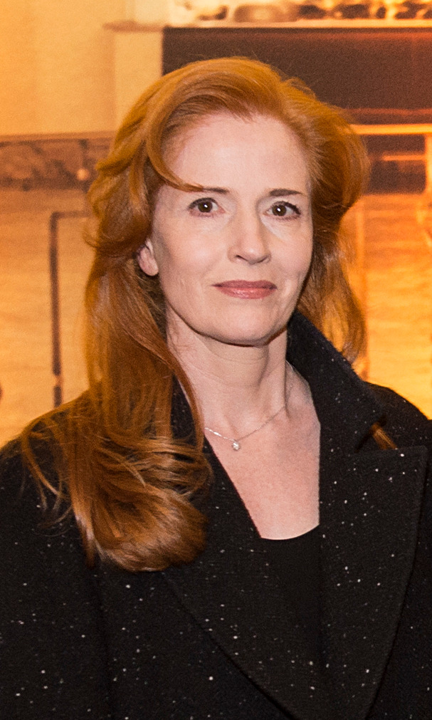 Bretonische Verhältnisse Premiere am 16.04.2014 in München Sibylle Canonica